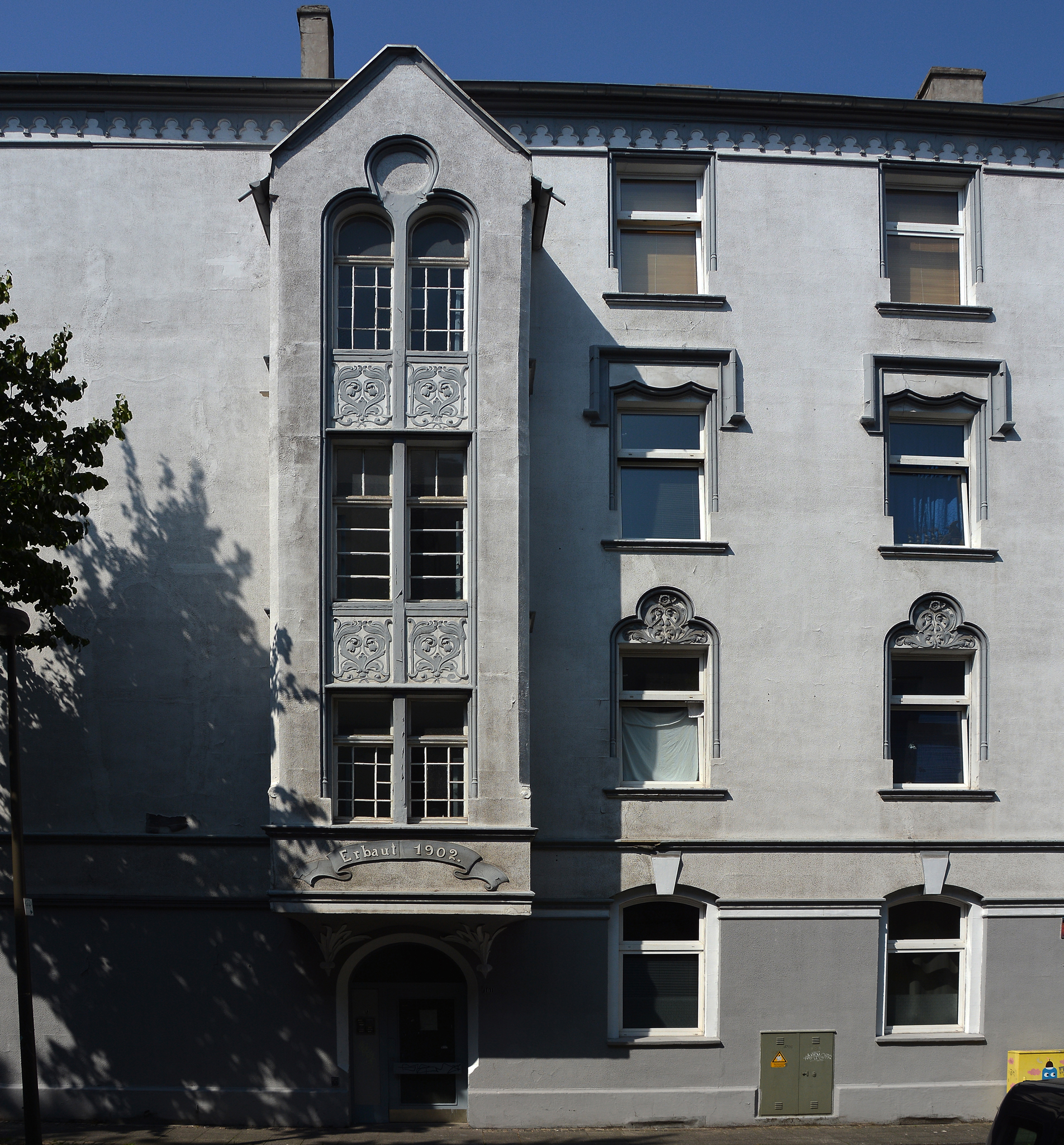 Wohnhaus eines Opfers des Naziterrors